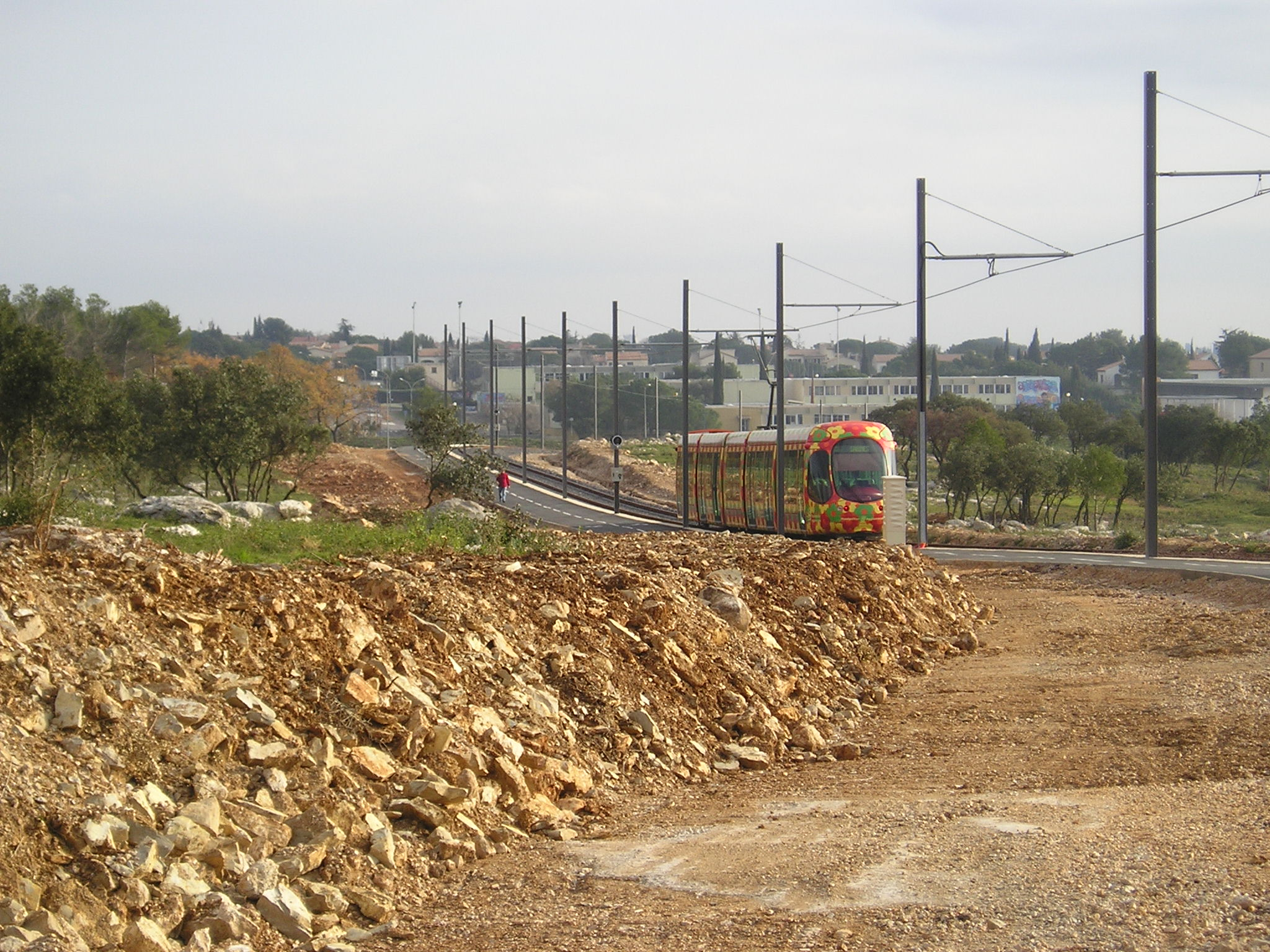 Rame de la ligne 2 du Tramway de Montpellier entre les stations Georges Pompidou et Voie Domitienne, à Castelnau-le-Lez. A l'arrière-plan, Le Crès et le collège de la Voie Domitienne.